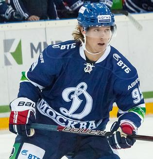 Нападающий московского «Динамо» Никлас Бэкстрём во время матча чемпионата КХЛ против донецкого «Донбасса» 31 октября 2012 года.